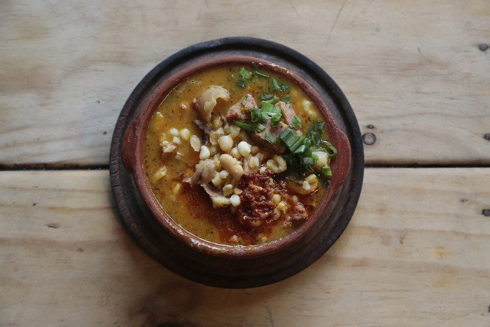 Un plato de locro, plato típico argentino.